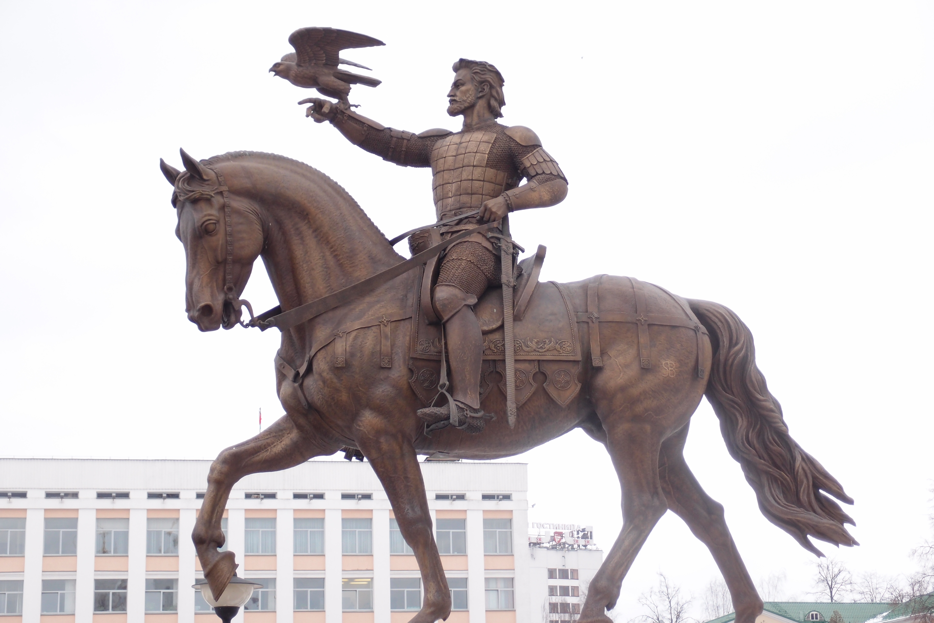 Alhierd monument in Viciebsk